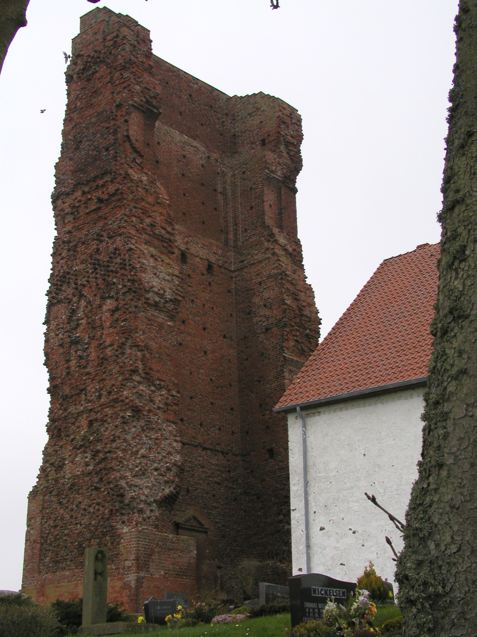 Pellworm alteKirche historischer Turm